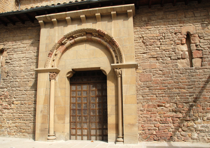 cilleria